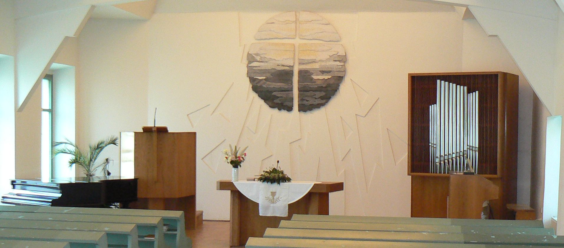 Interiér evangelického kostela (modlitebny) v Poděbradech. V současné podobě dílo architektů Jiřího a Barbory Veselých